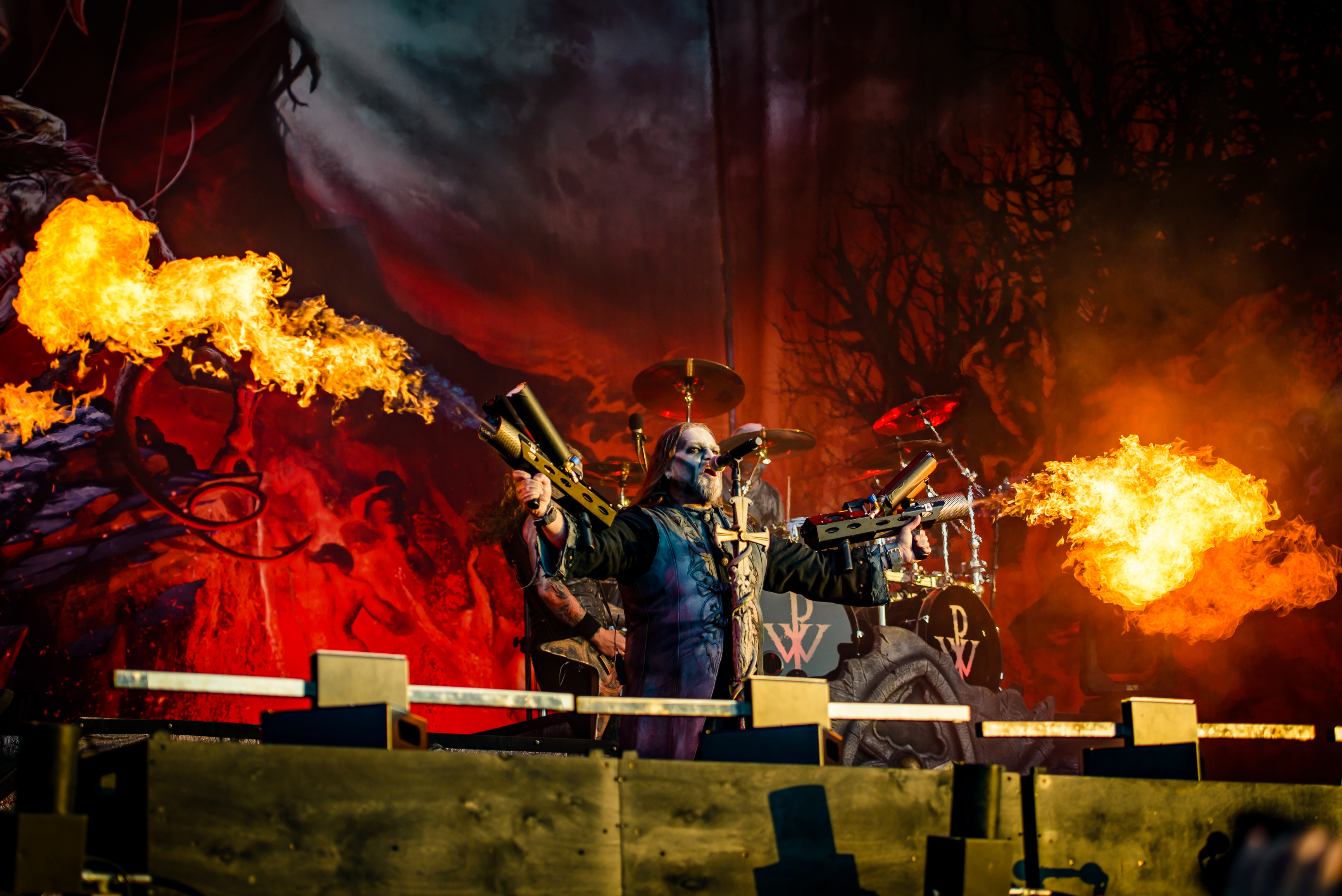 'Wacken Open Air 2019; Wacken': 'Powerwolf'